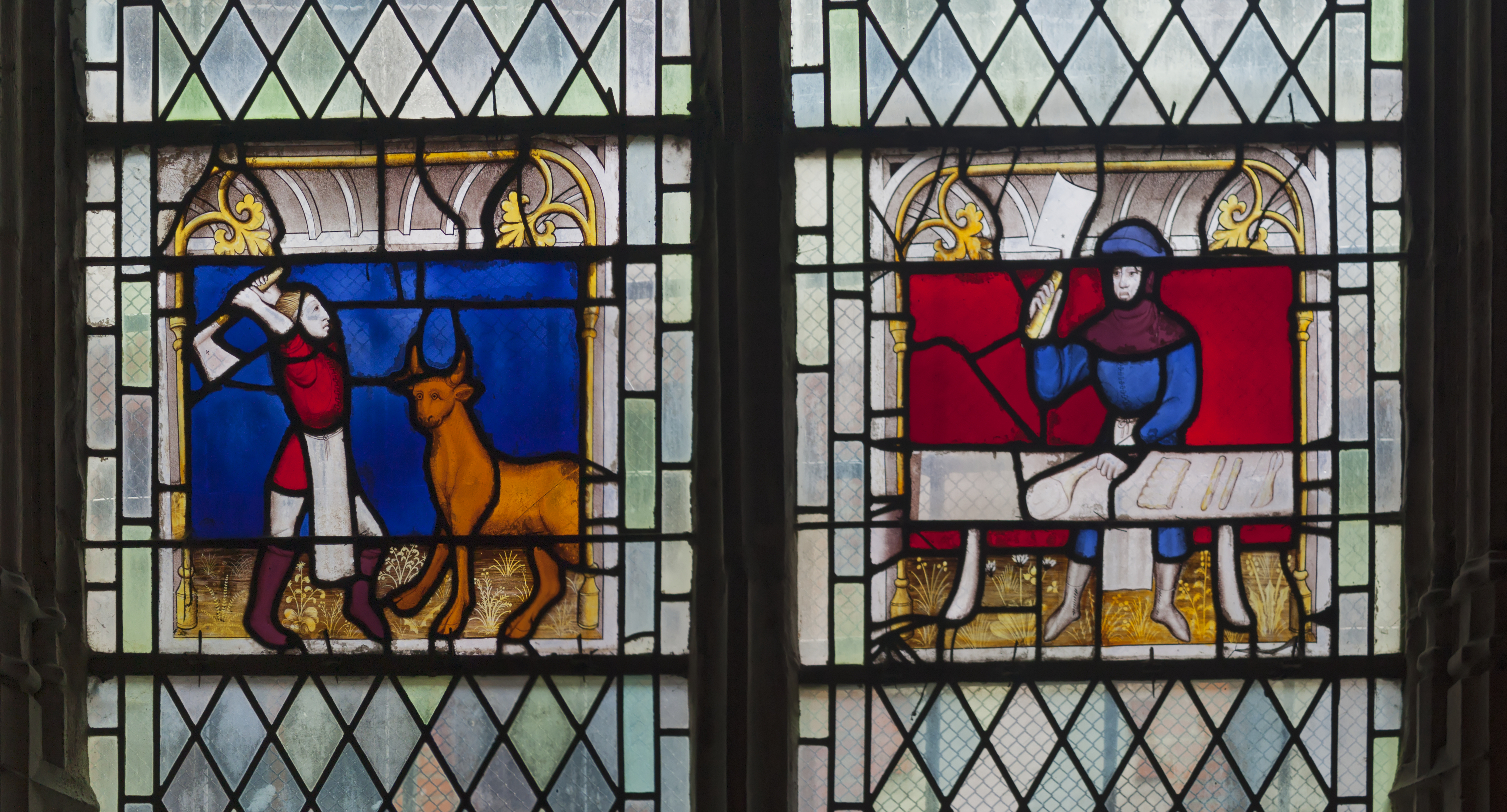 Du vitrail de la corporation des bouchers ne subsistent que deux panneaux, l' abattage du bétail et la découpe à l'étalage